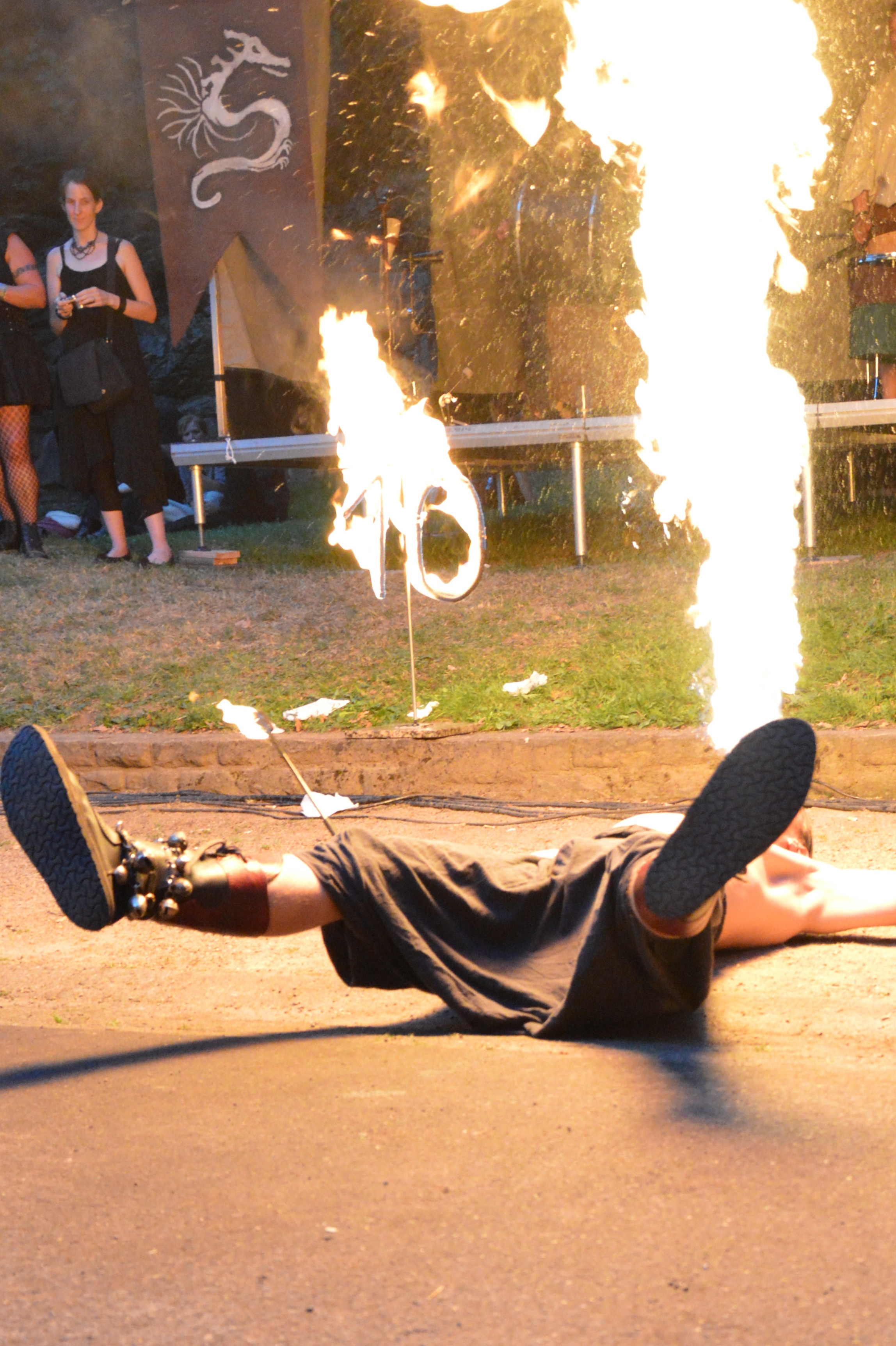 Feuerkünstler beim Feuertal-Festival 2013